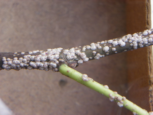 Ramo infestato da Ceroplaste del fico, foto propria scattata personalmente.